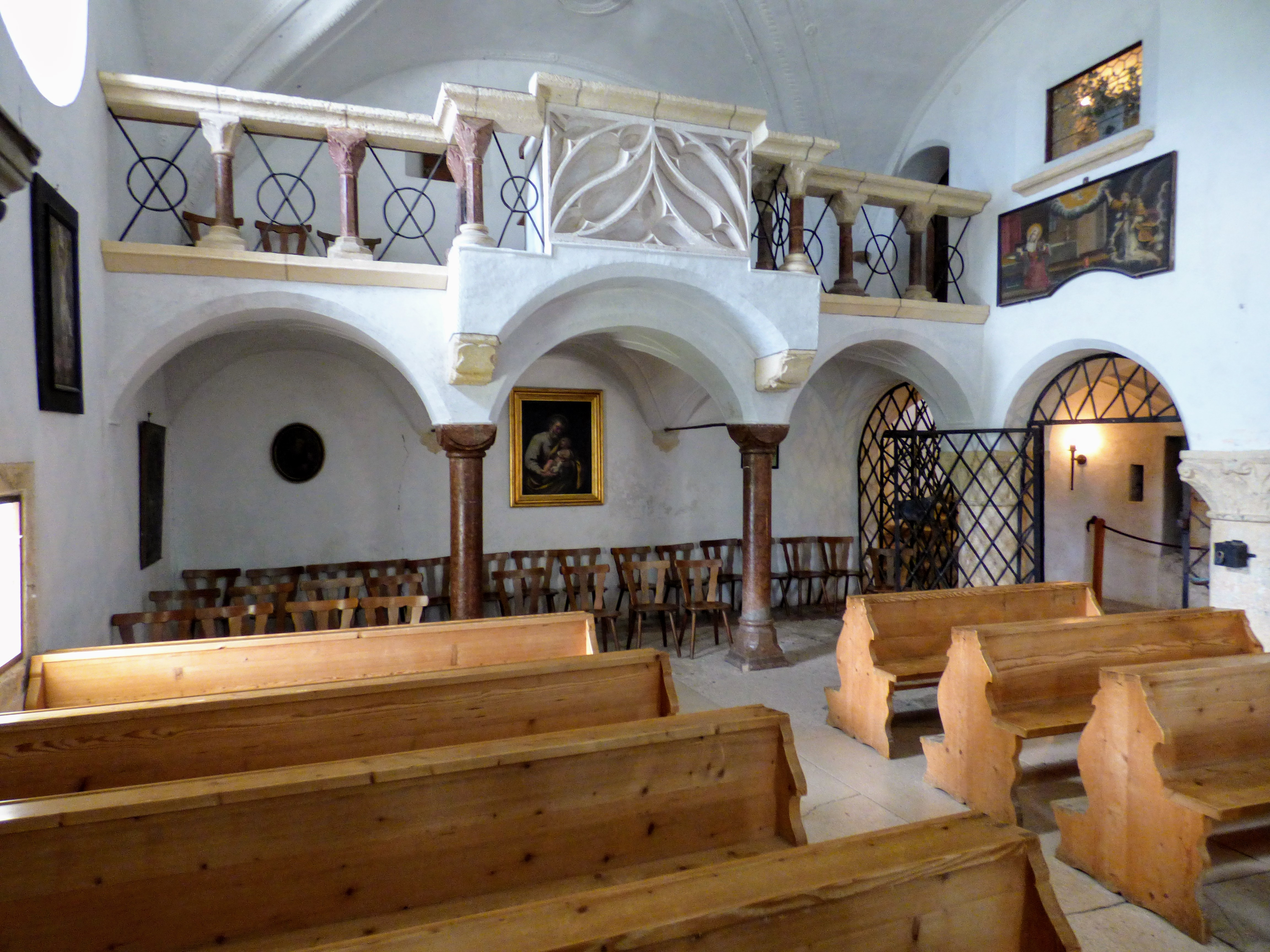 Festung Hohenwerfen: Burgkapelle